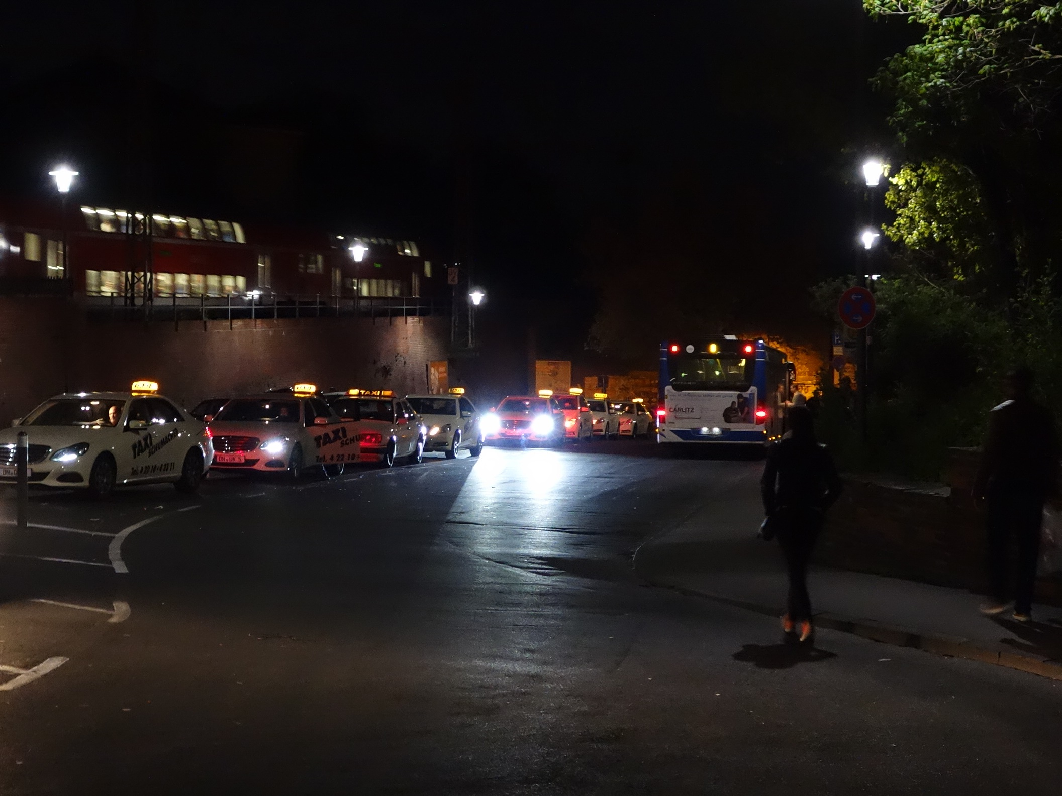 Kurz vor Mitternacht wartet in Düren der Nachtbus der Dürener Kreisbahn (DKB) auf umsteigende Fahrgäste aus dem Doppelstockzug aus Richtung Köln, um diese bedarfsgesteuert an ihren Zielort zu bringen.